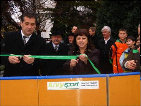 škola, otvorenie ihriska